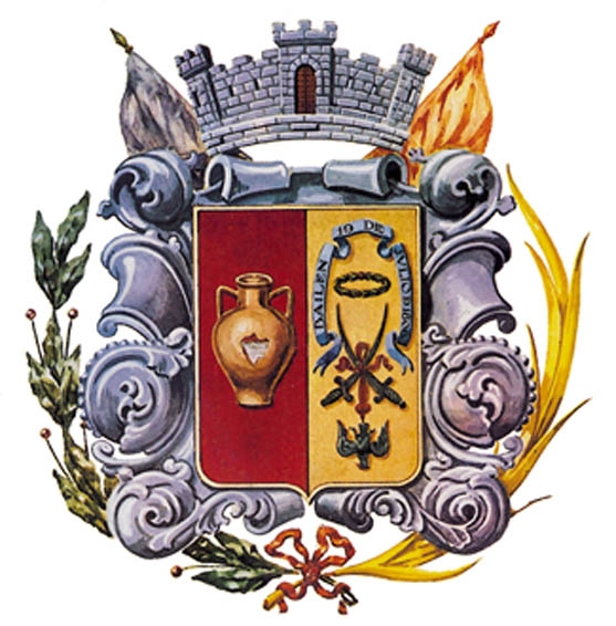 Escudo de Bailén (Jaén) (España)